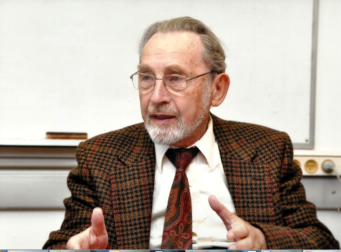 פרופ' דוד הלבני